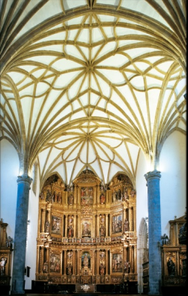 San Joan Bataiatzailearen eliza, Hernanin.